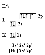 Elektronenkonfiguration eines Sauerstoffatoms; selbstgezeichnet